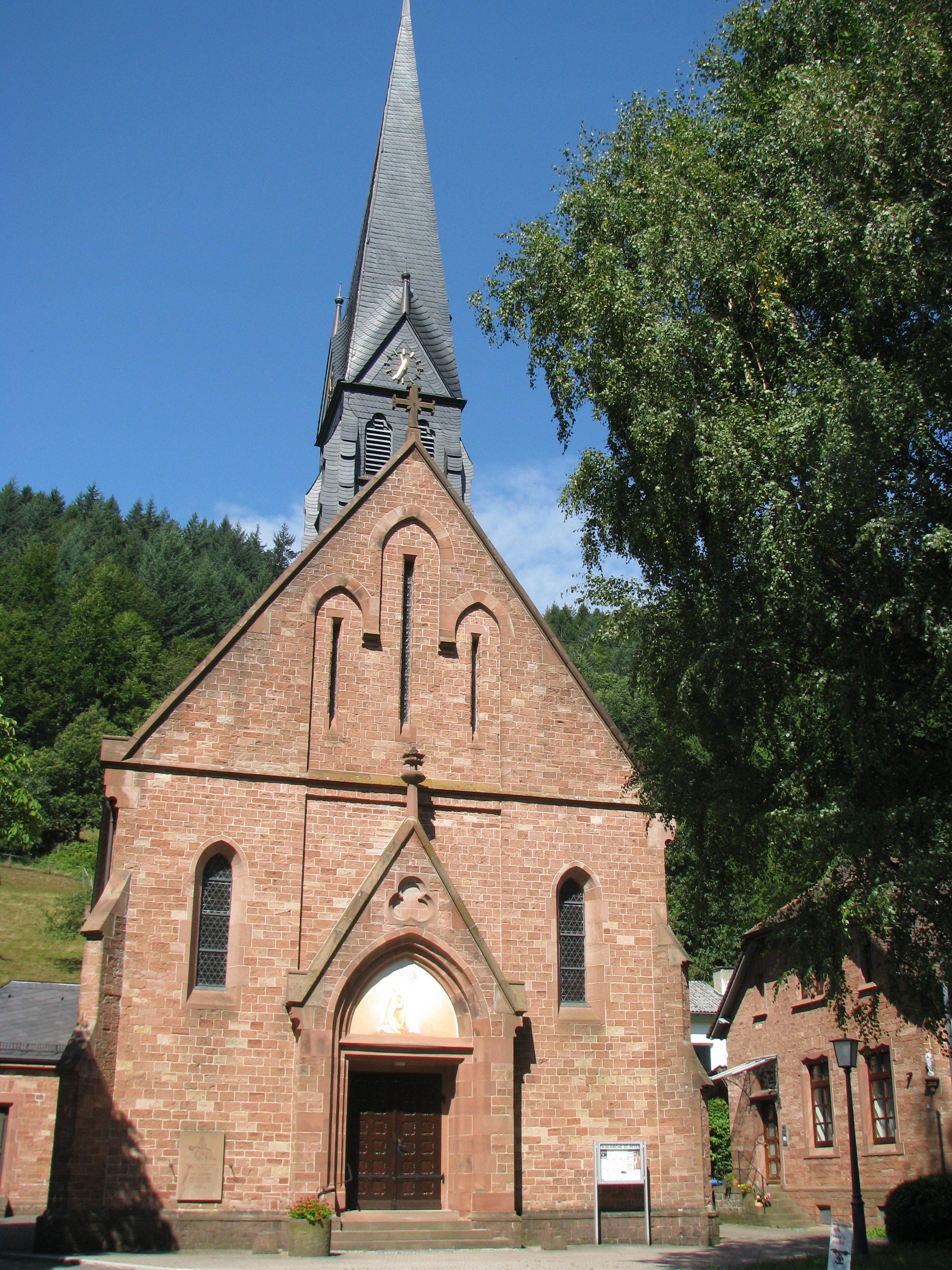 Kath. Filialkirche St. Peter in Heidelberg-Peterstal, erbaut 1896, Architekt: Ludwig Maier